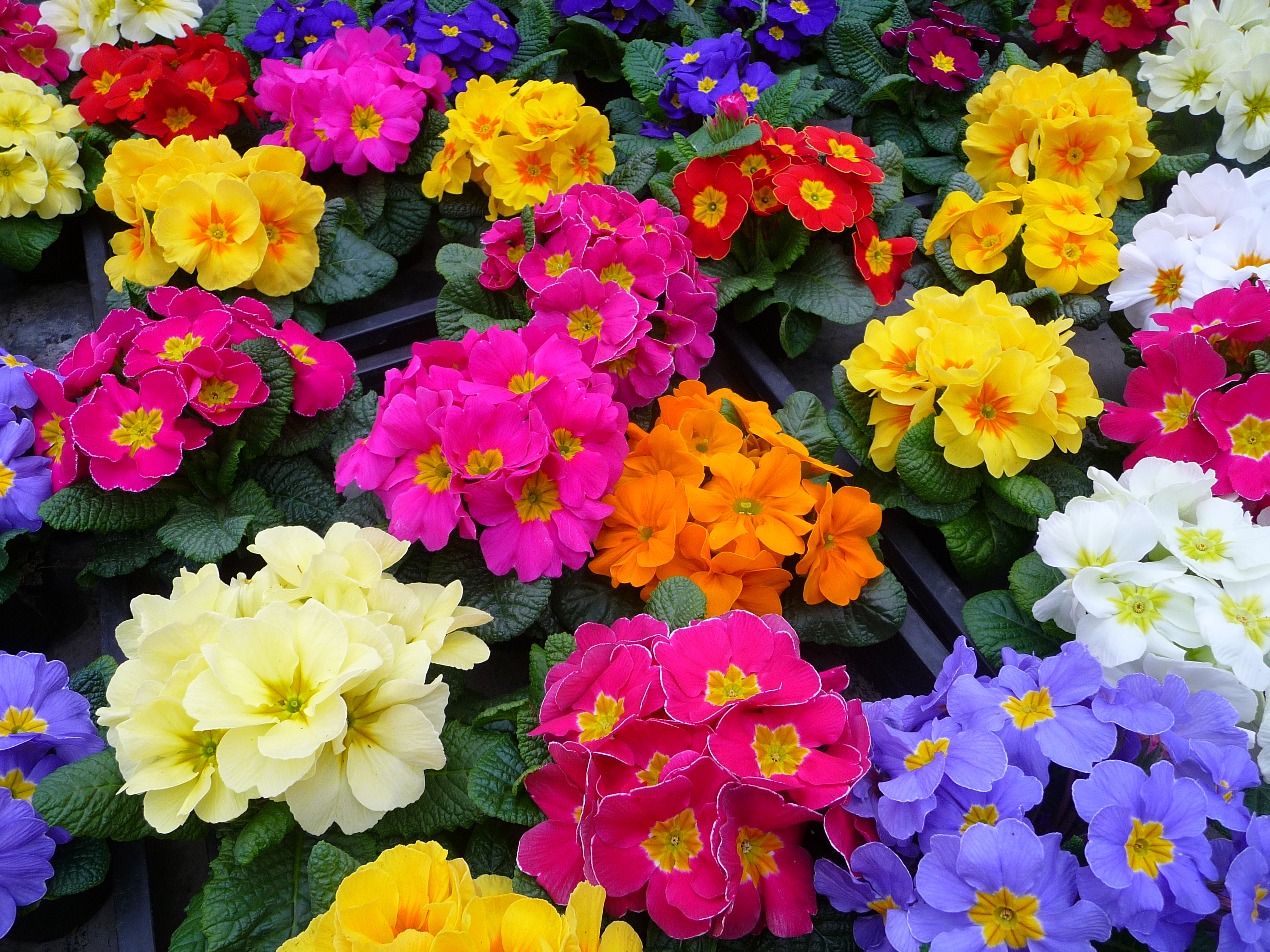 Primeln